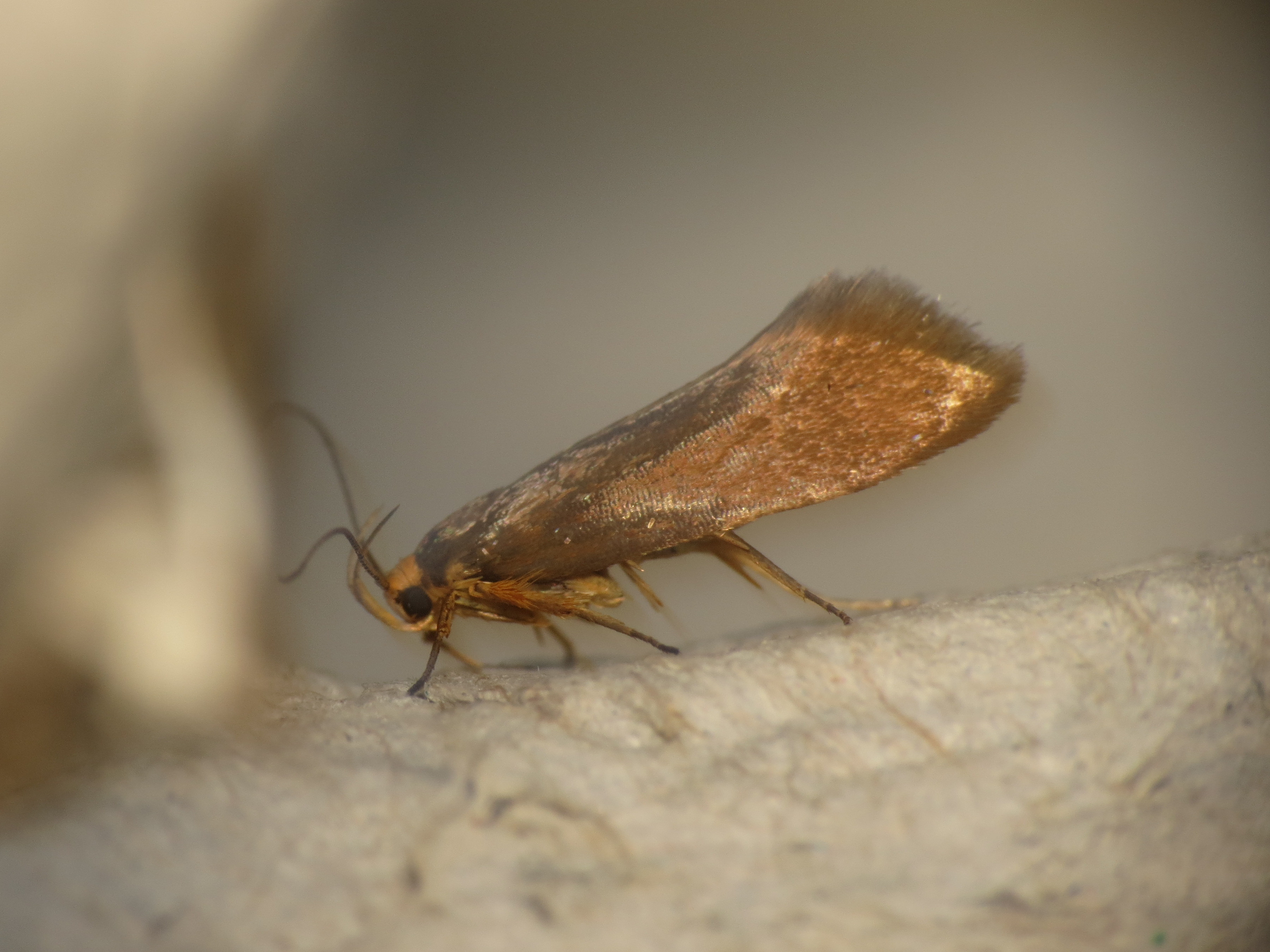 Crassa unitella (Hübner, [1796]), to Robinson trap, Søborg, Denmark, 10/11 July 2014